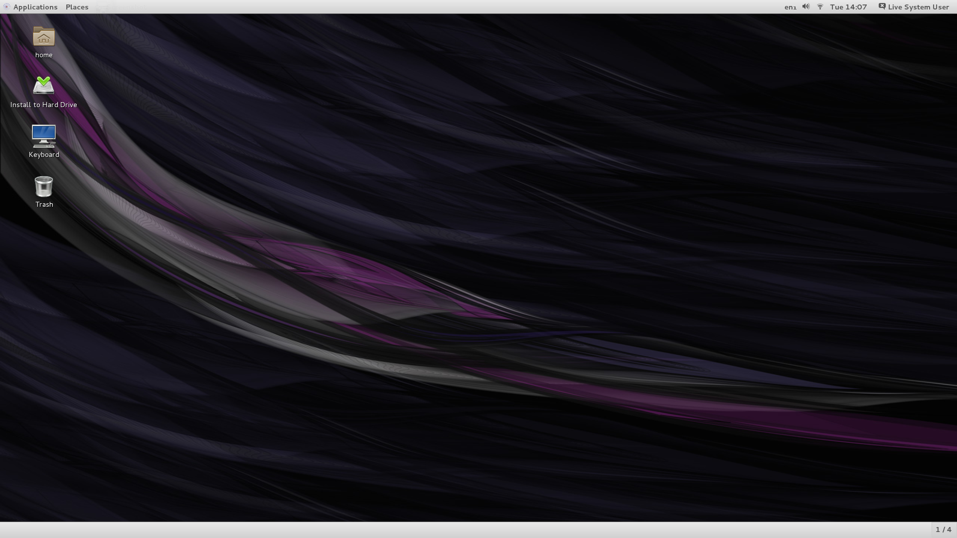 Pracovní plocha distribuce Scientific Linux 7